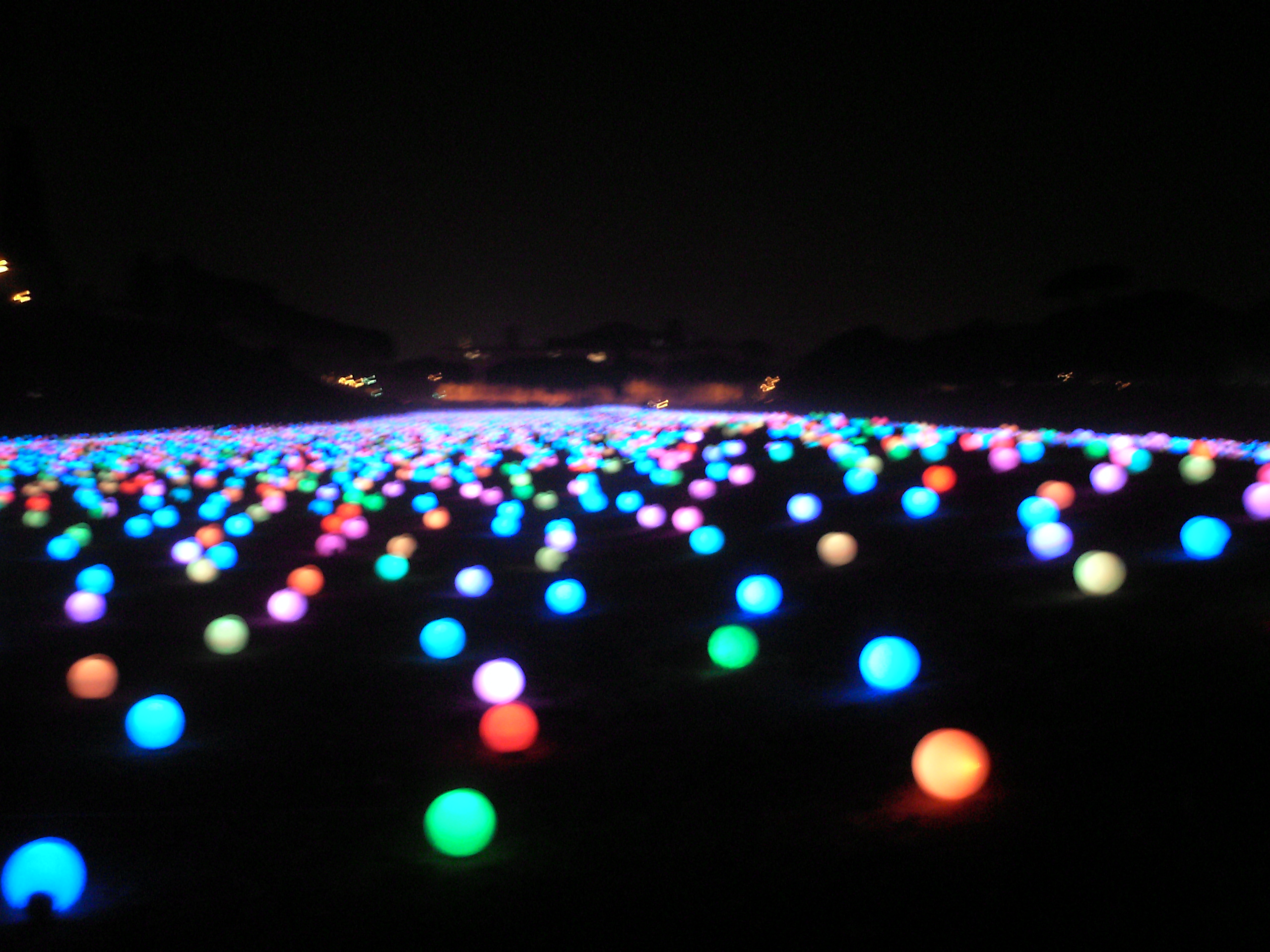 "Massimo Silenzio", installation by Giancarlo Neri